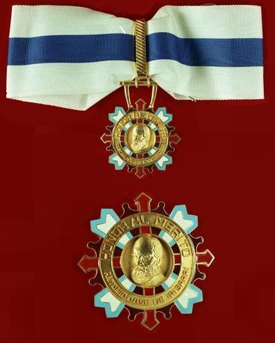 16.11.1987 Orden für Bundespräsident Richard von Weizsäcker, verliehen anlässlich des Staatsbesuches im März 1987 im Guatemala.